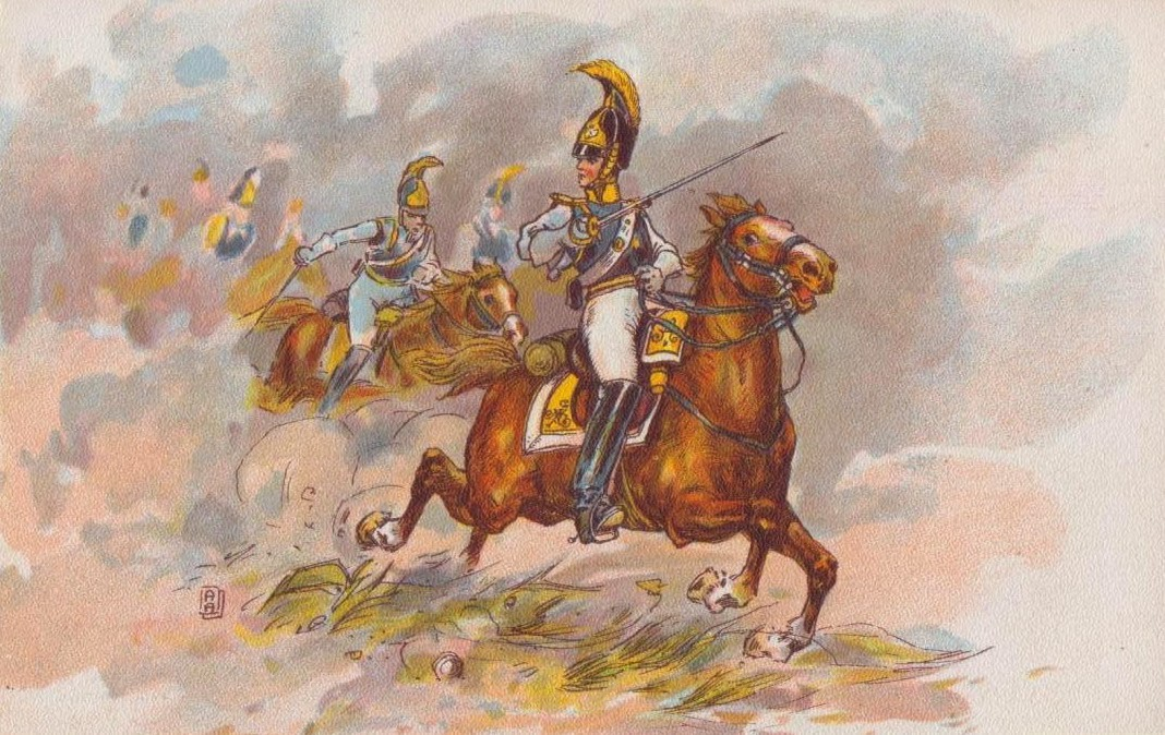 Атака кирасир.